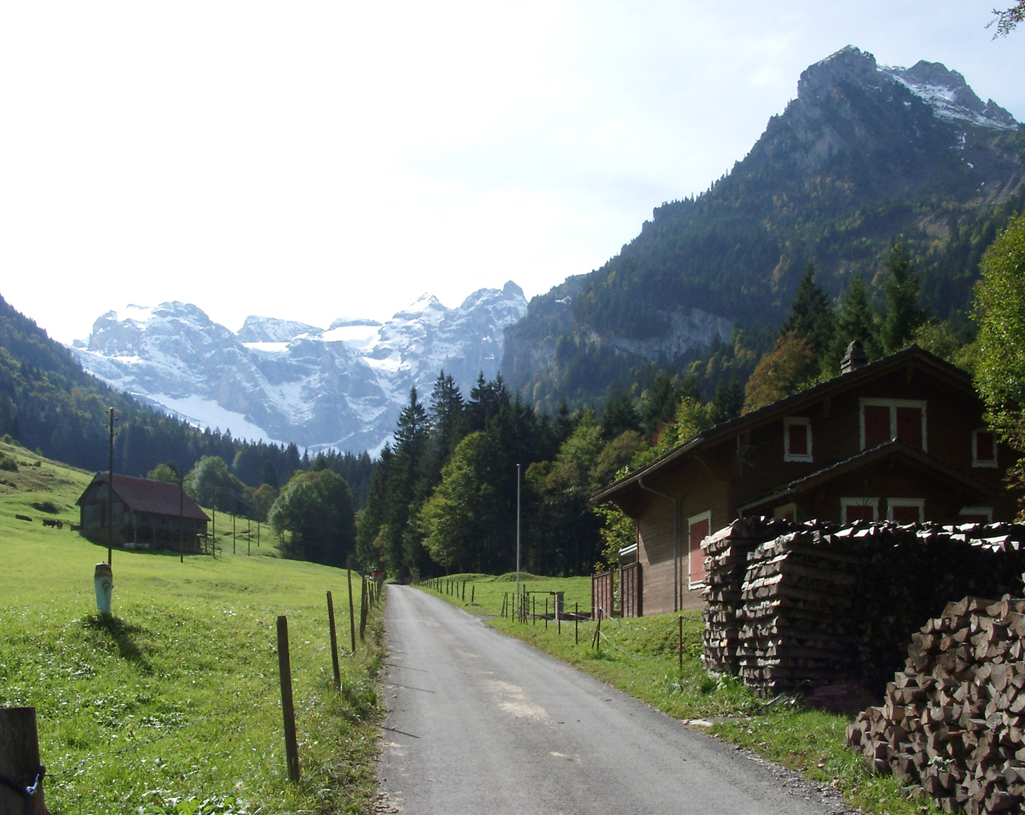 Das Isental bei St. Jakob; Kanton Uri/Zentralschweiz